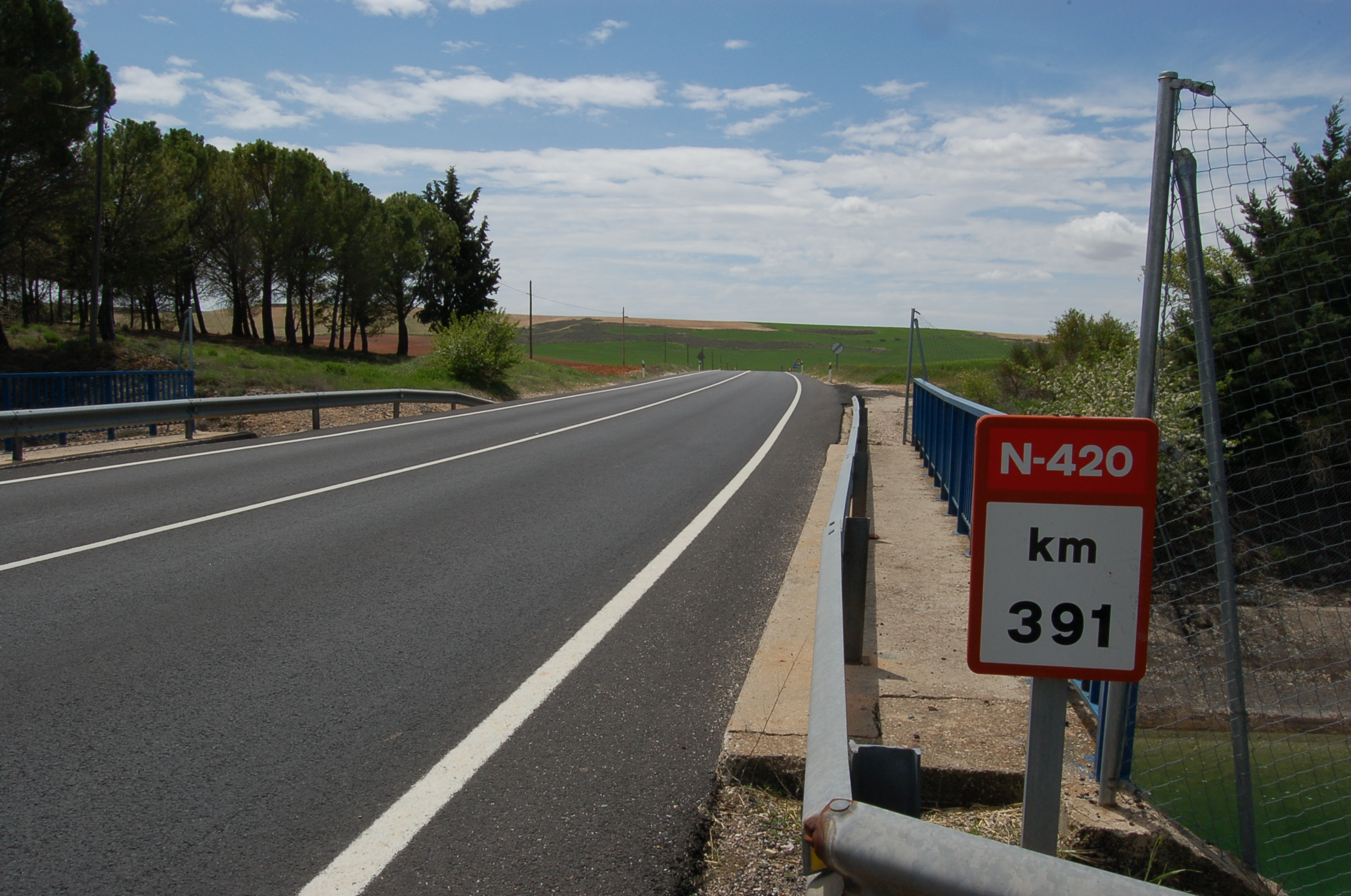 Estrada N-420 km 391 Belmontejo